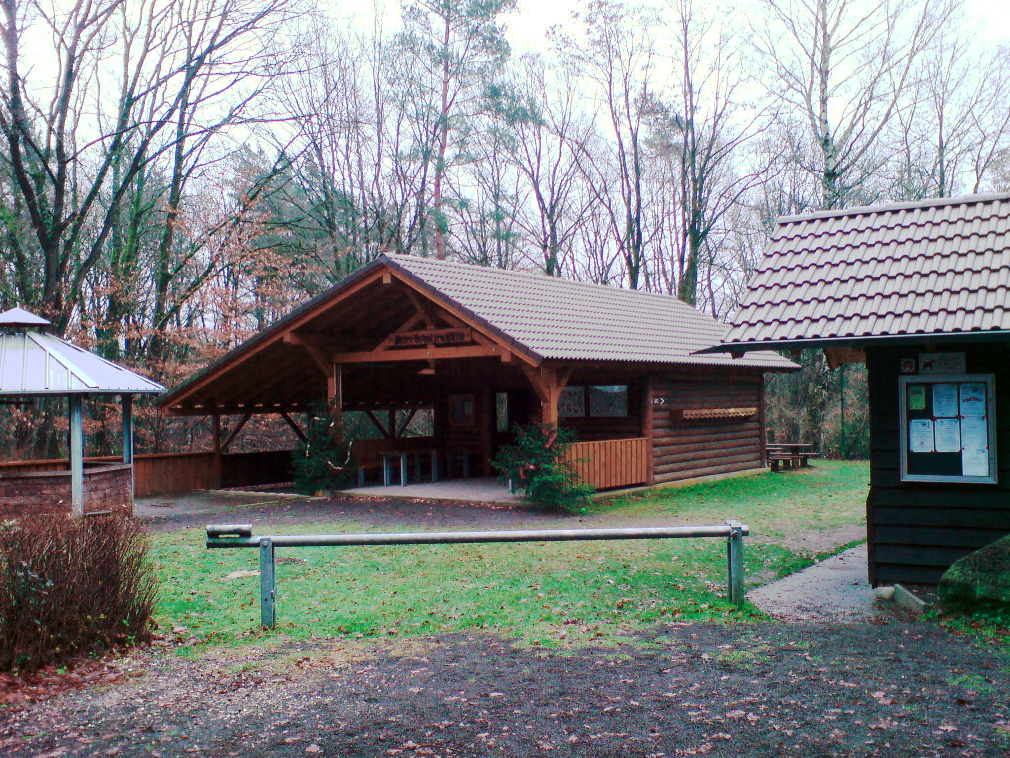 Die Peter Schulzen Hütte des Pfälzerwaldverein Homburg Erbach